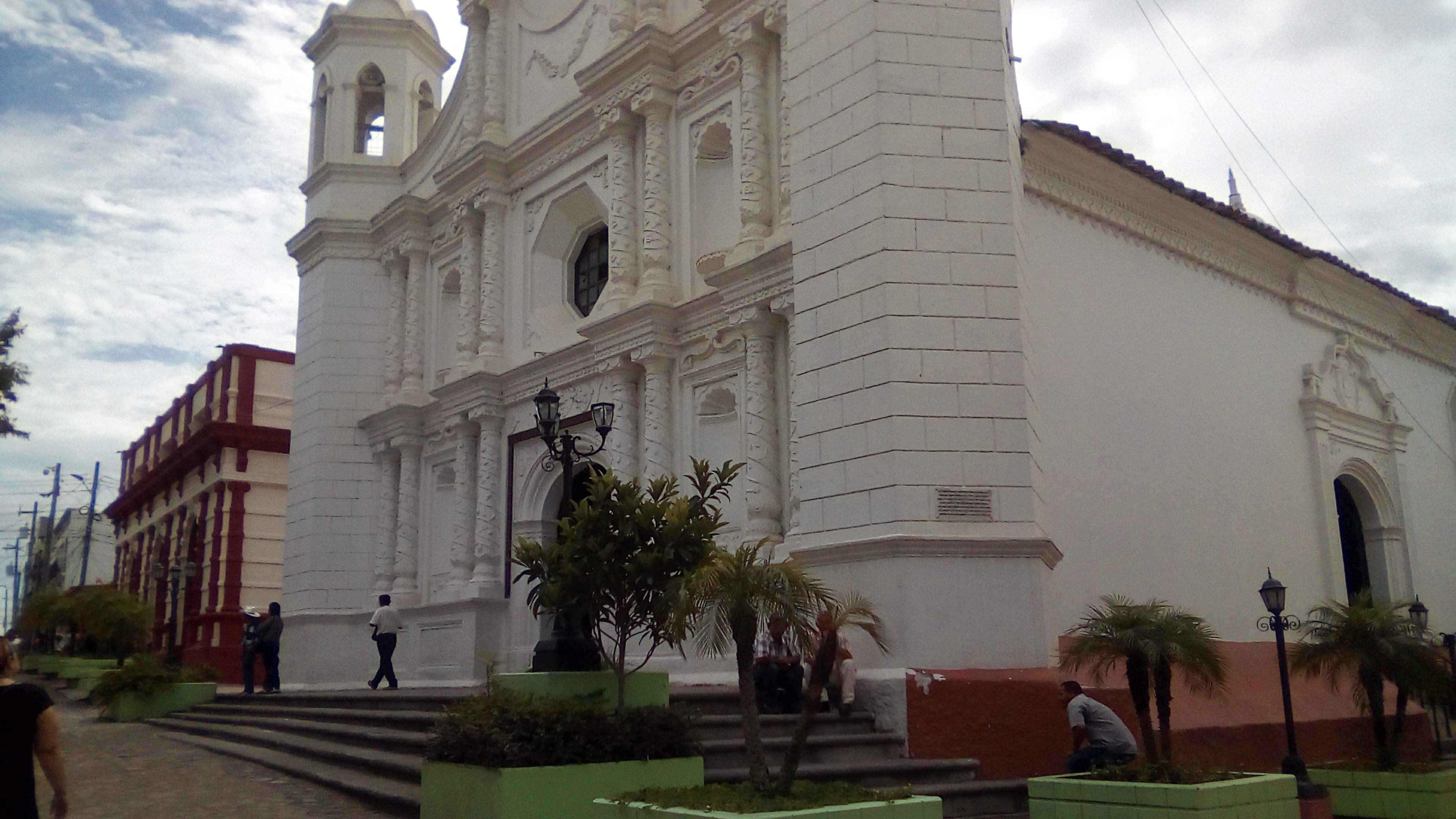 Parque y catedral de Santa Rosa